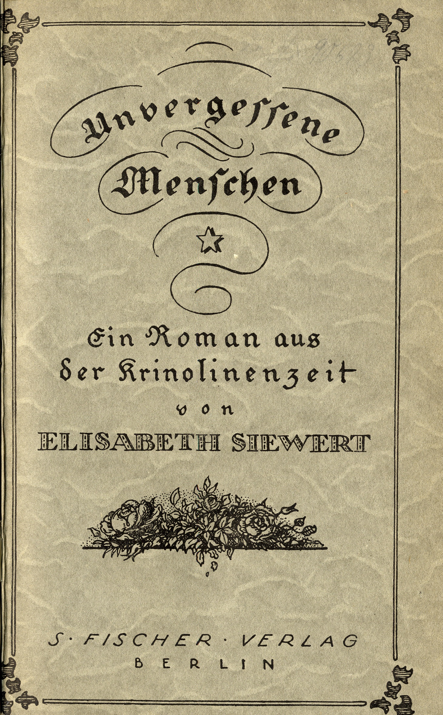 Cover of the novel Unvergessene Menschen. Ein Roman aus der Krinolinenzeit. Written by Elisabeth Siewert (1867–1930). S. Fischer Verlag, Berlin 1911.